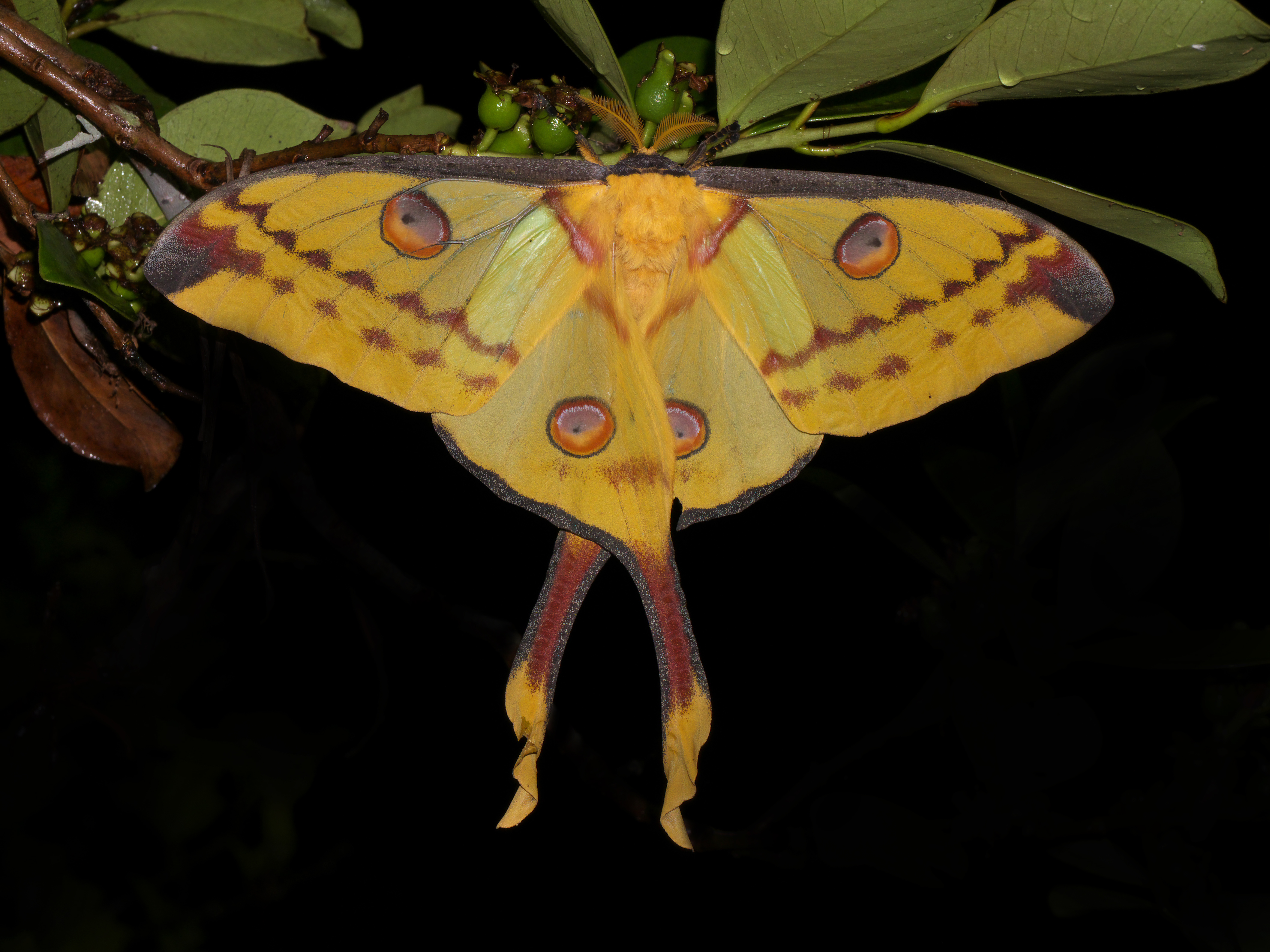 Panasonic GX7 + Leica DG Macro-Elmarit 45mm F2.8 ASPH OIS